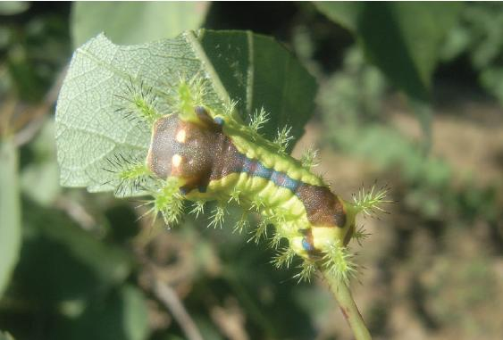 Monema flavescens